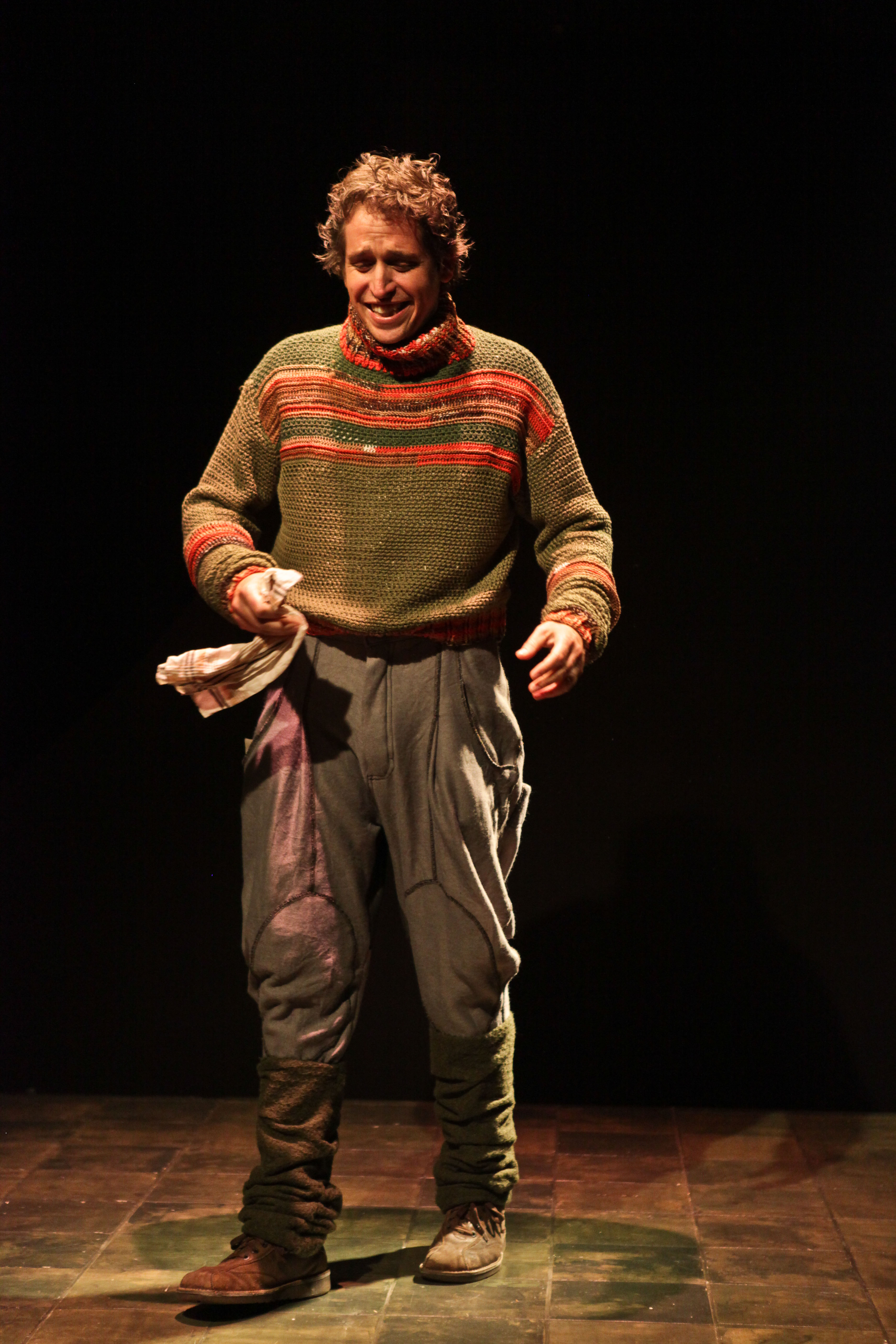 יואב היימן ב"מולי סוויני", תיאטרון החאן